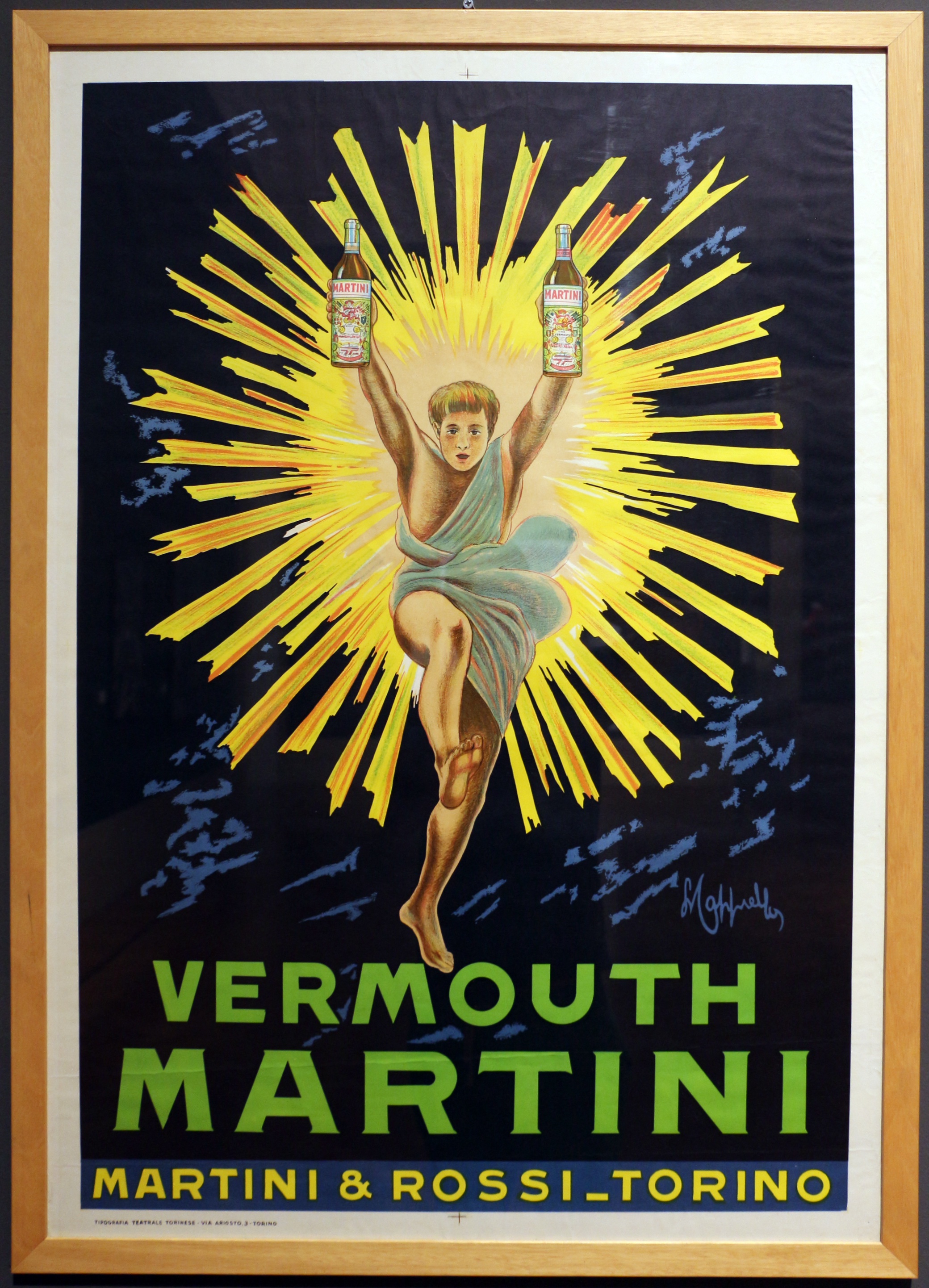 Corporate art exhibition (Galleria nazionale d'arte moderna 2015) This is a photo of a monument which is part of cultural heritage of Italy.